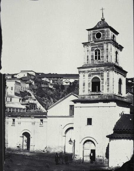 Iglesia de San Francisco de Valparaíso en 1864, fotografia colodion humedo de Rafael Castro y Ordoñez. Posteriormente, la torre fue demolida y reemplazada por otras edificaciones. El arquitecto Ricardo Larraín Bravo construyó una nueva torre central. Esta es la iglesia que estaba en el barrio Puerto, atrás de la Matriz. Precisamente en la Plazuela San Francisco, que hoy ocupa la Policía de Investigaciones.